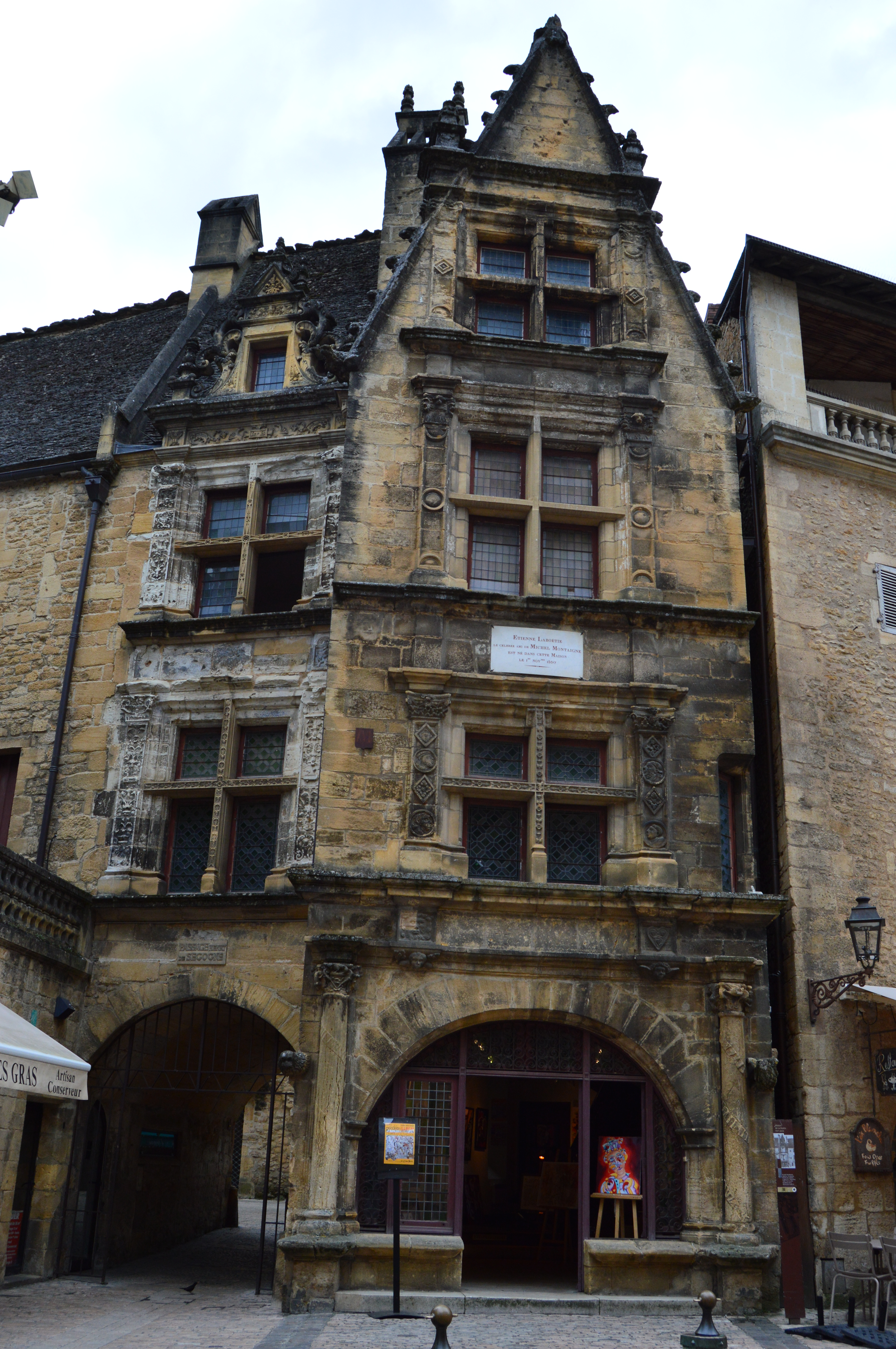 Maison d'Étienne de la Boétie, à Sarlat-la-Canéda (Dordogne, France).